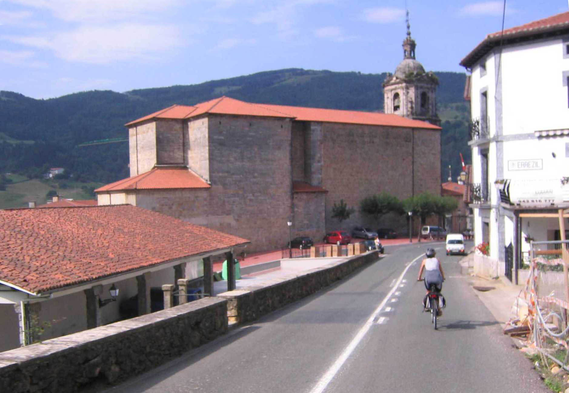 Calle de Régil, Guipúzcoa, País Vaco, España.